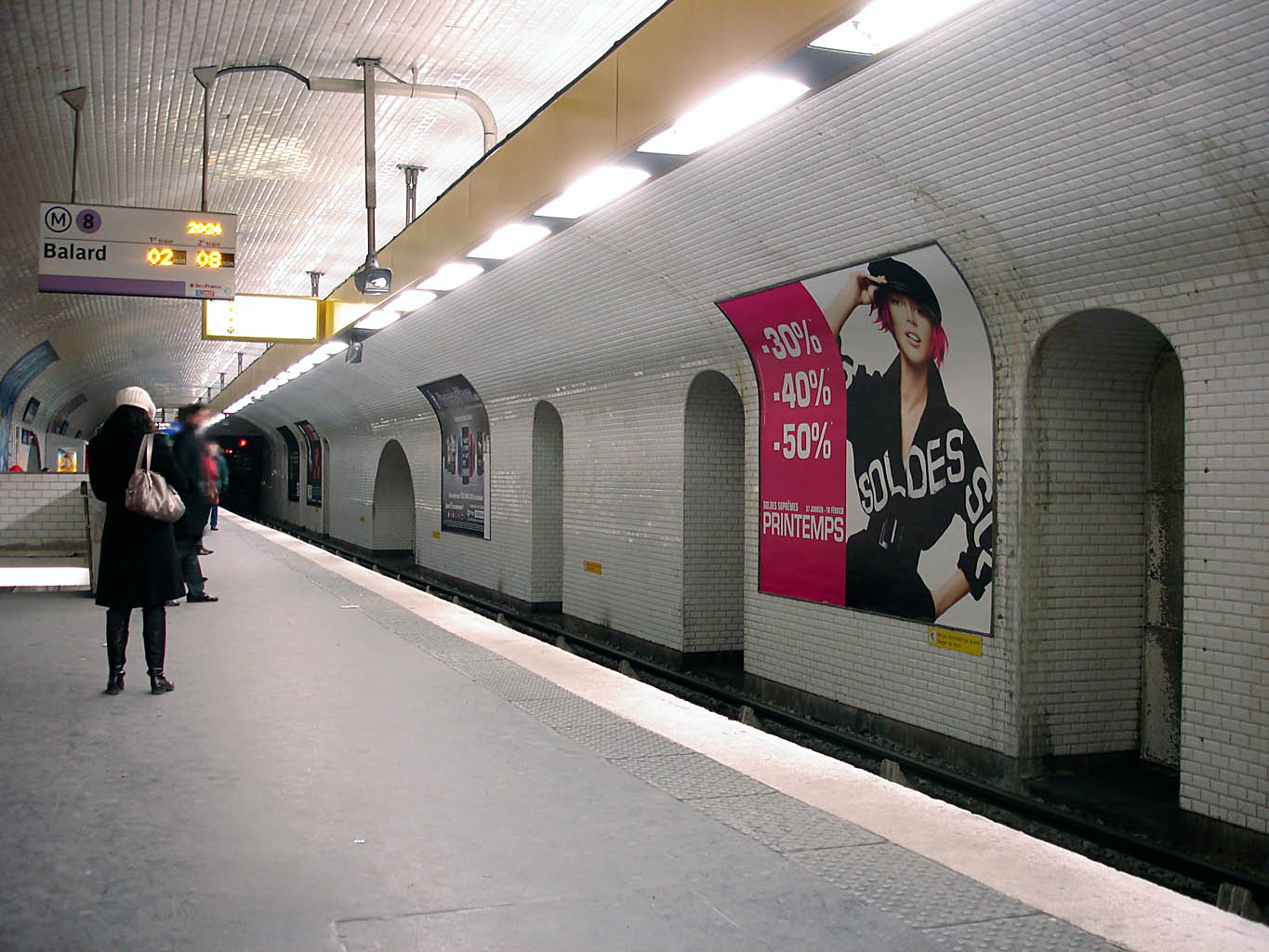 Station République de la ligne 8 du métro de Paris, France.